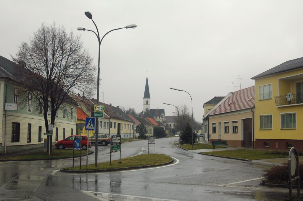 Jedenspeigen